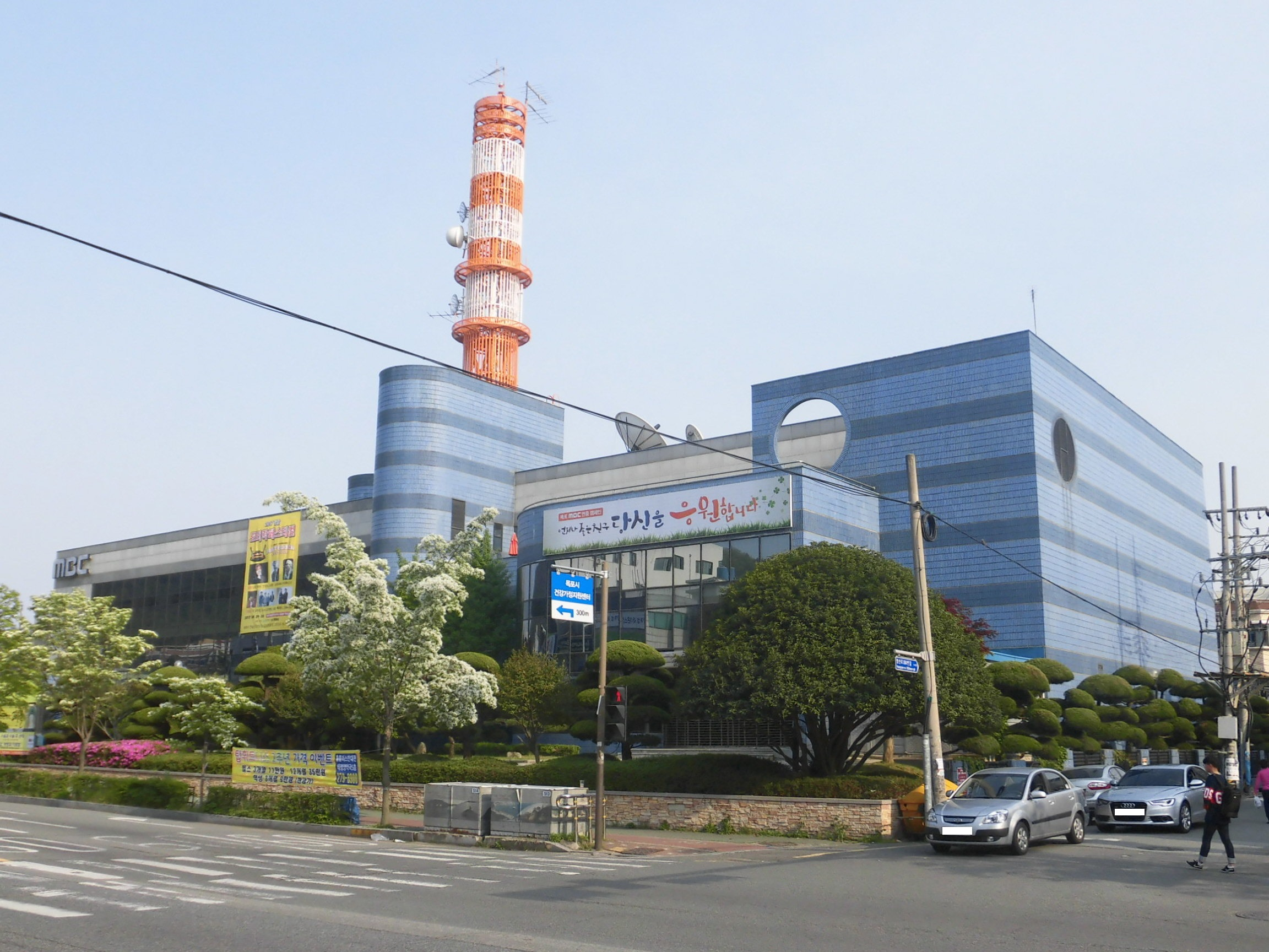 전라남도 목포시에 있는 목포문화방송